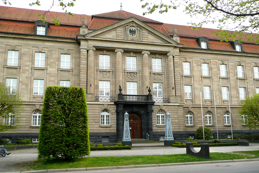 Ehemalige Oberpostdirektion Hannover